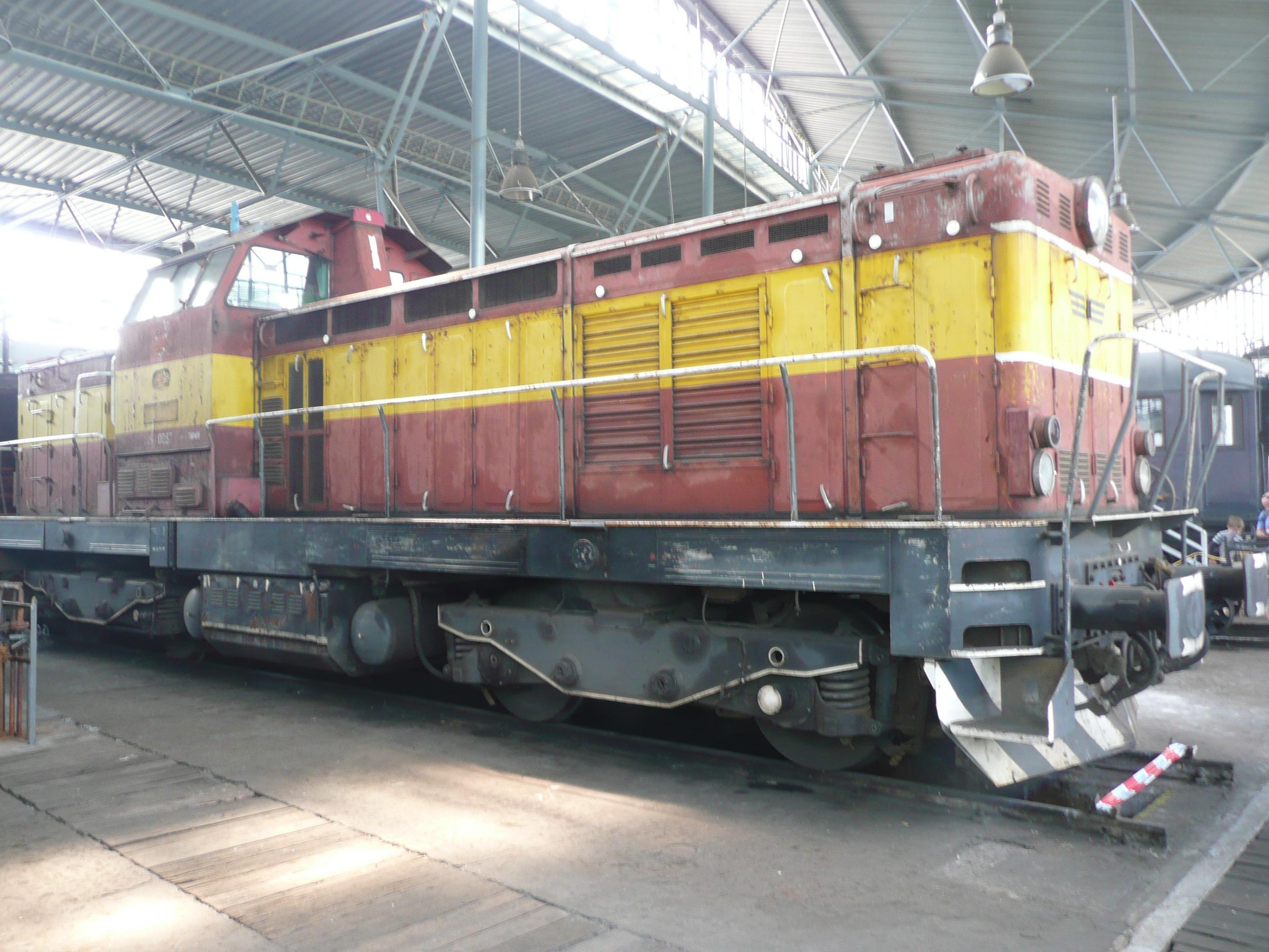 T 466.0257 im Heizhaus von Chomutov